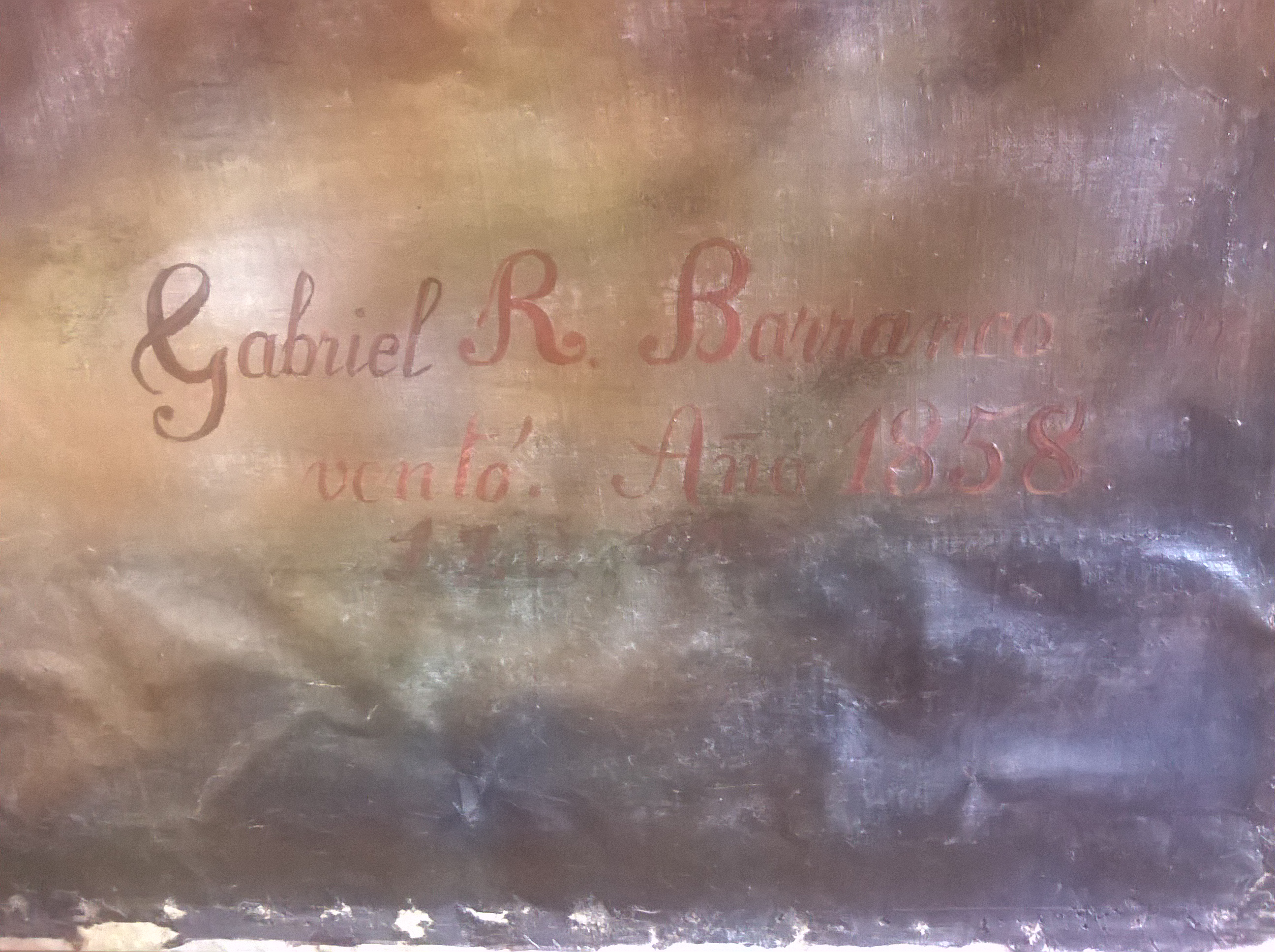 Gabriel Barranco, pintor orizabeño